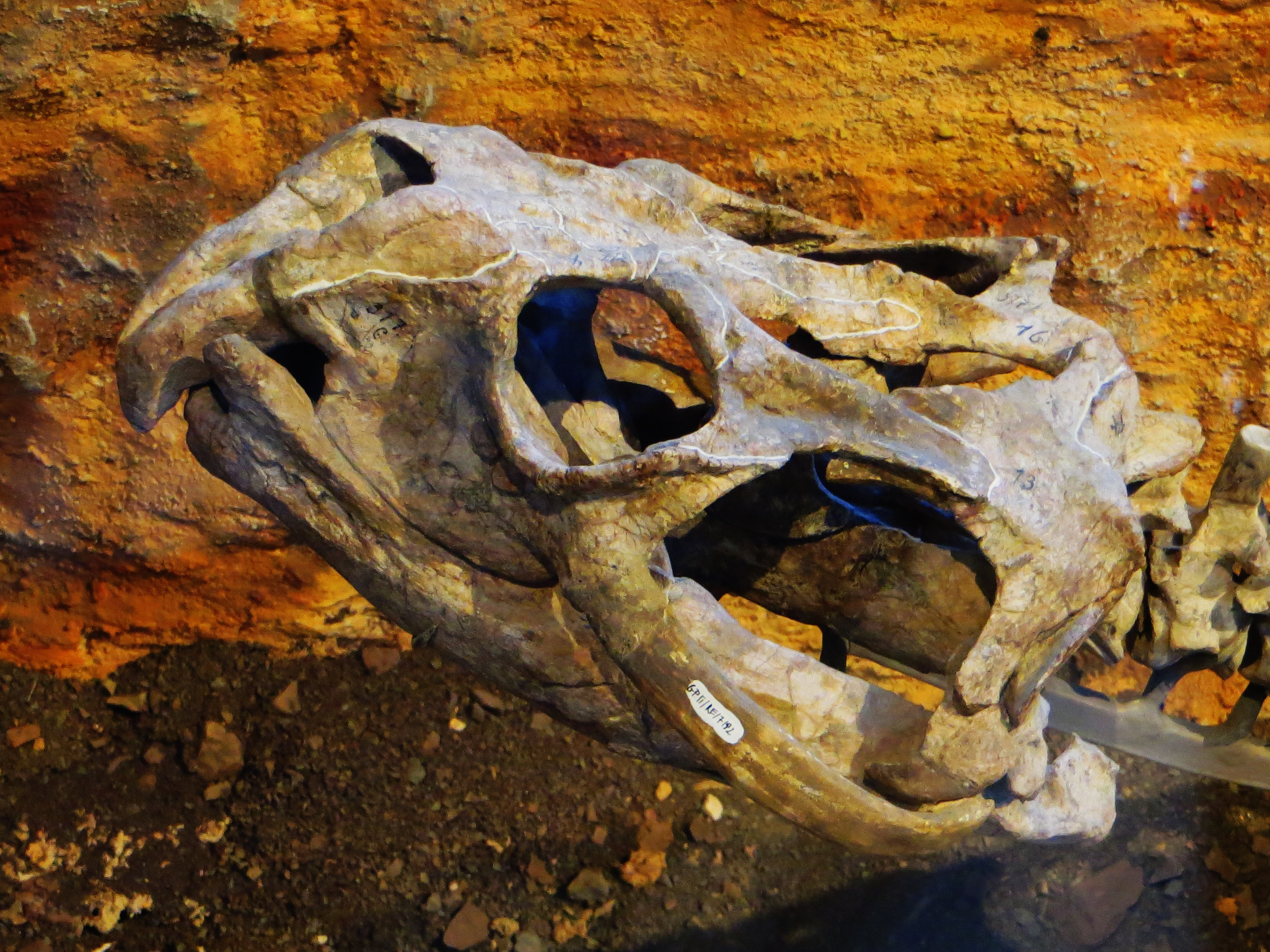 Fossil of Stenaulorhynchus, an extinct reptile- Took the picture at Museum of Paleontology, Tuebingen